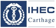 Logo de l'IHEC Carthage